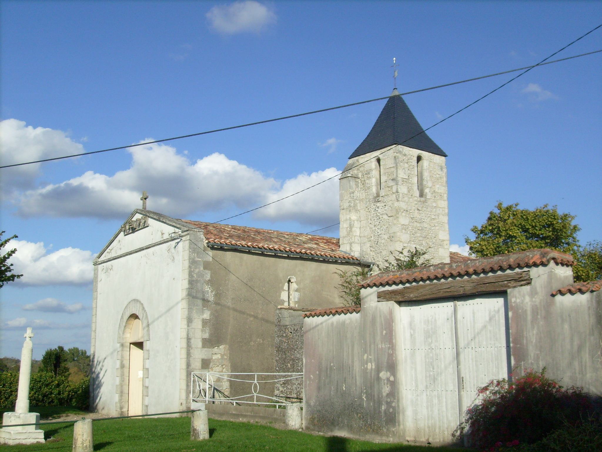 Eglise de Sainte-Ramée